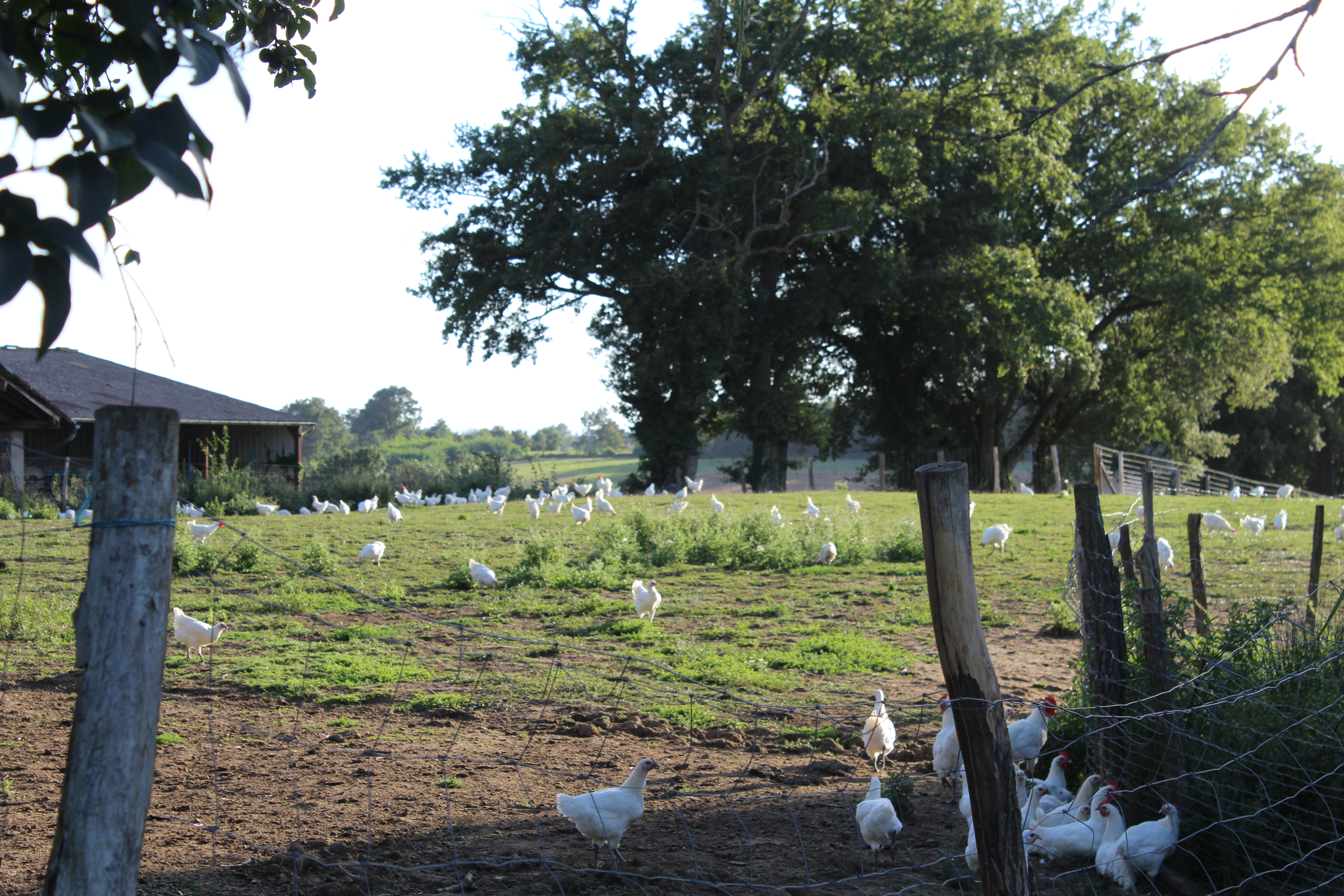 Volailles de Bresse dans un enclos à Dommartin dans l'Ain.